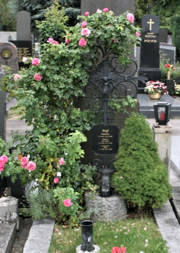 Friedrich Wolf-Friedhof Döbling